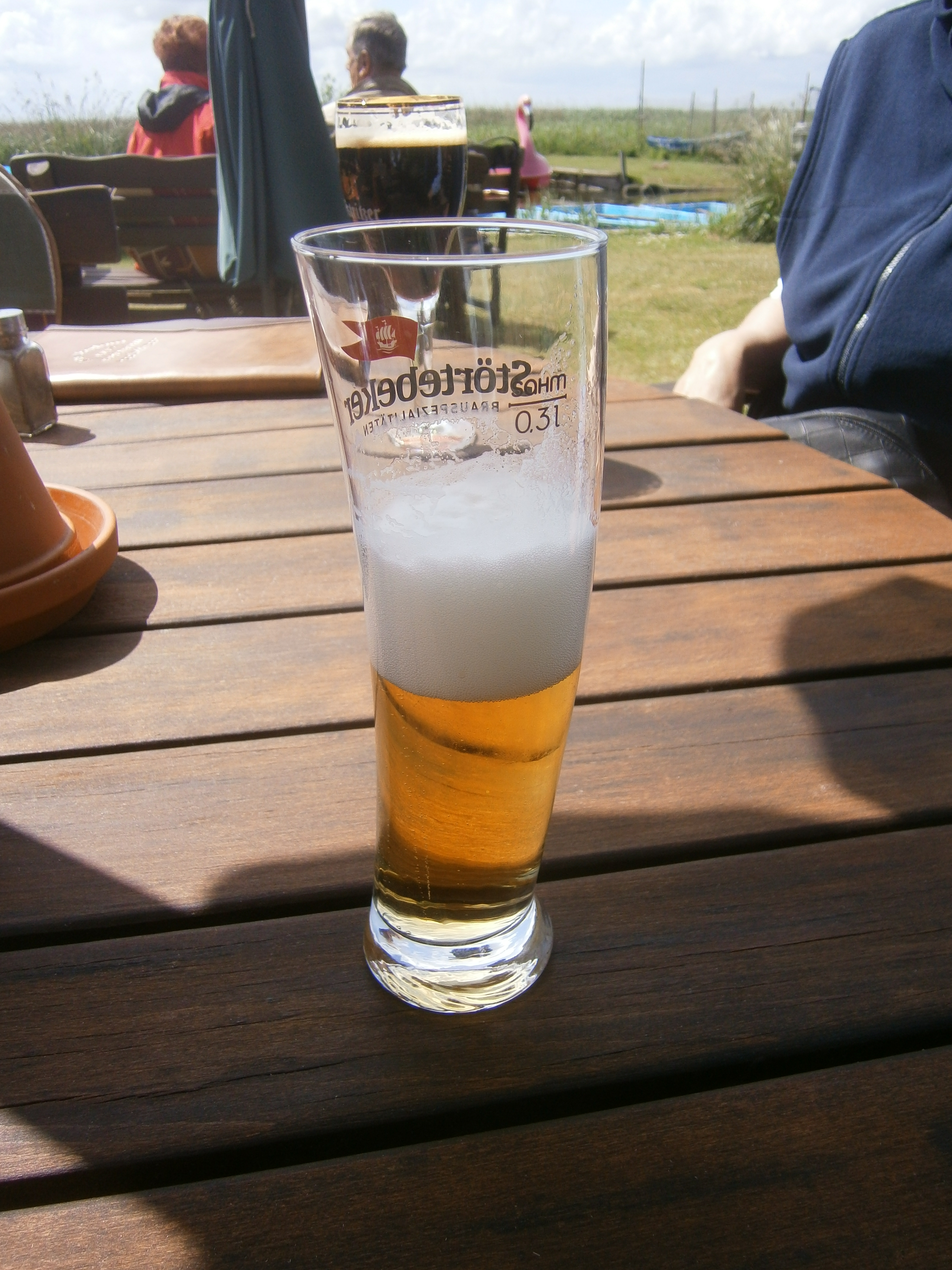 Designergläser mit Einsatz für Bier kommen in den 2000er Jahren auf um die Identität der Marke zu markieren. Das Bierglas wurde in Form eines Segels gestaltet um die Nähe zum Meer und zur Schifffahrt für die Biermarke "Störtebeker" zu kennzeichnen. Diese Glasform für ein norddeutsches Weizenbier wird in Gaststätten an der Ostsee für alle Bierarten der benannten Brauerei eingesetzt.